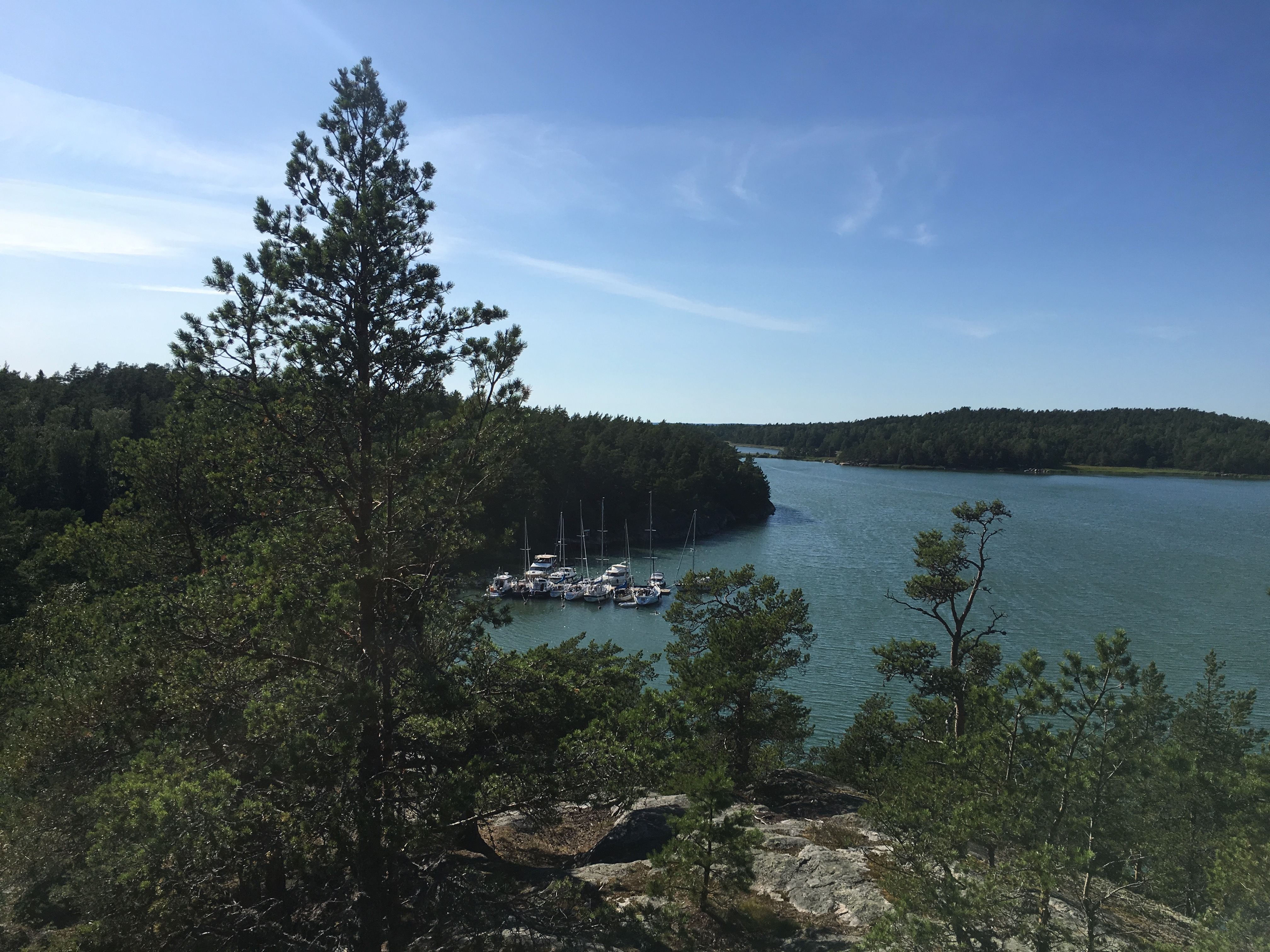 Pähkinäisten laituri luontopolulta nähtynä. Turun ulkoilualue.